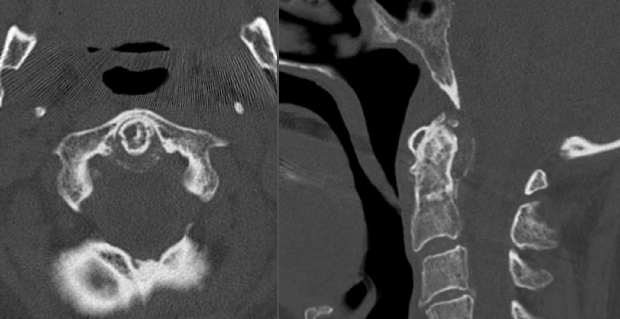 So genanntes "crowned dens syndrome" bei einer 95 jährigen Frau: Ablagerungen von Hydroxylapatit or Kalziumpyrophosphat um den Dens im Rahmen einer Chondrokalzinose. Gut zu erkennen auch das Ligamentum transversum atlantis mit Kalkeinlagerungen. Computertomographie axial und sagittal.